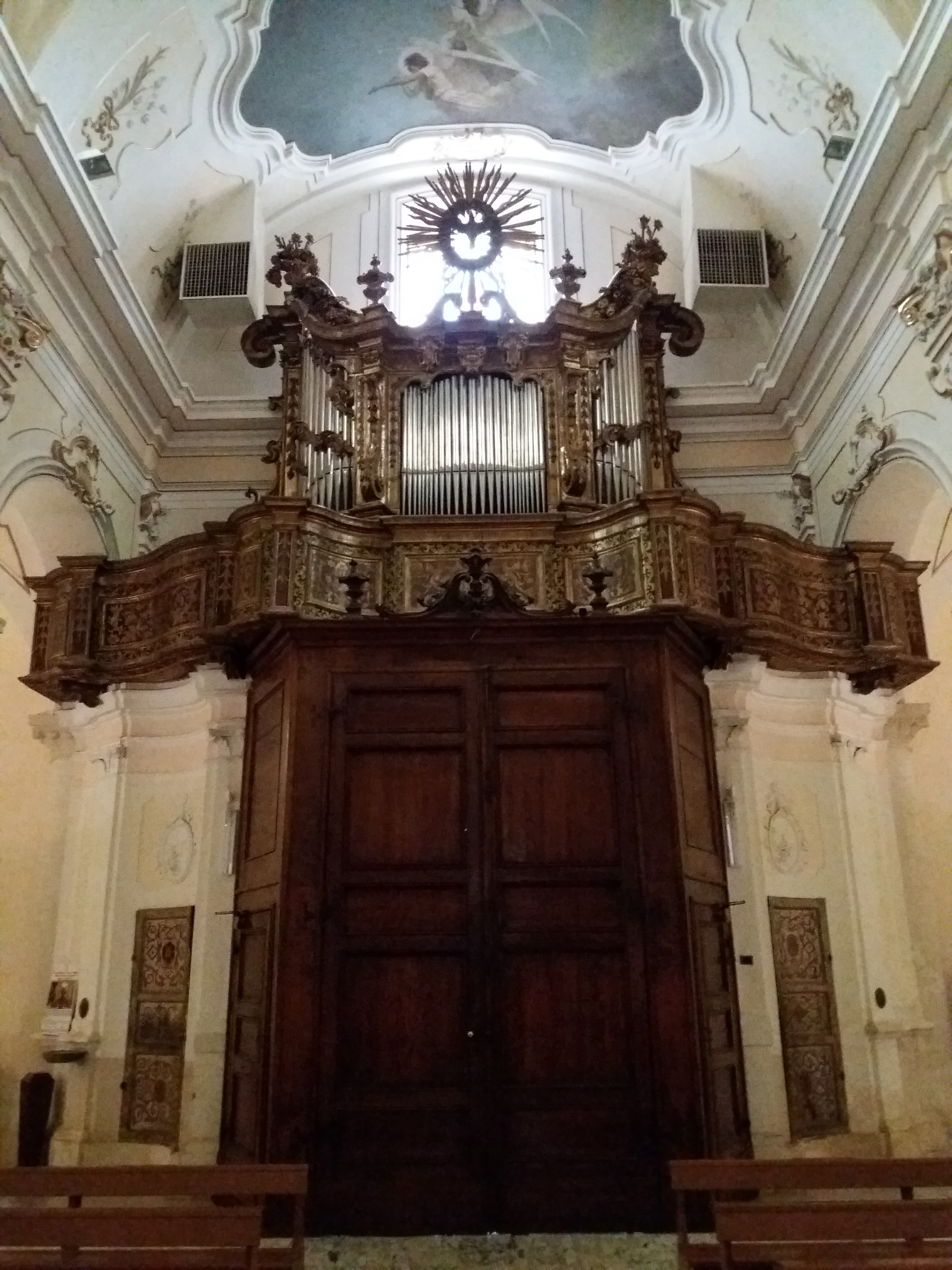 Sulmona: Cattedrale di San Panfilo